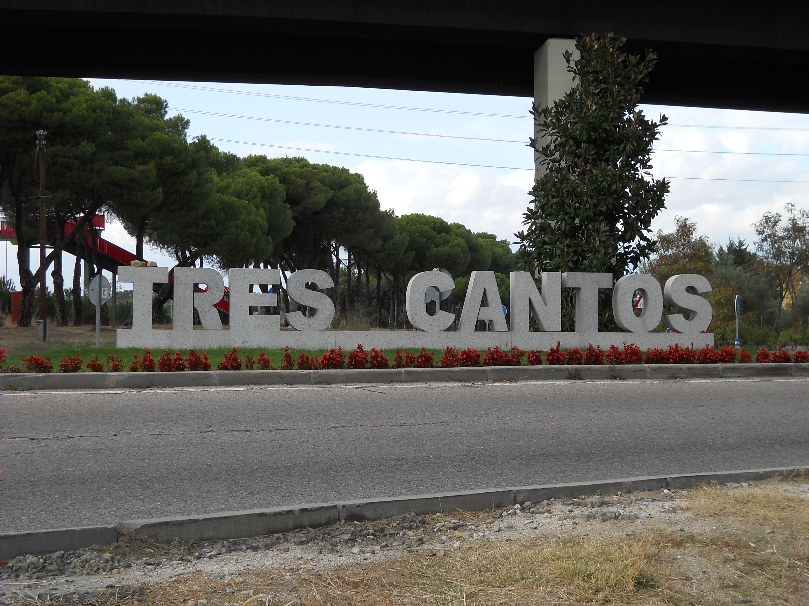 Cartel en granito a la entrada sur de Tres Cantos, Madrid, España